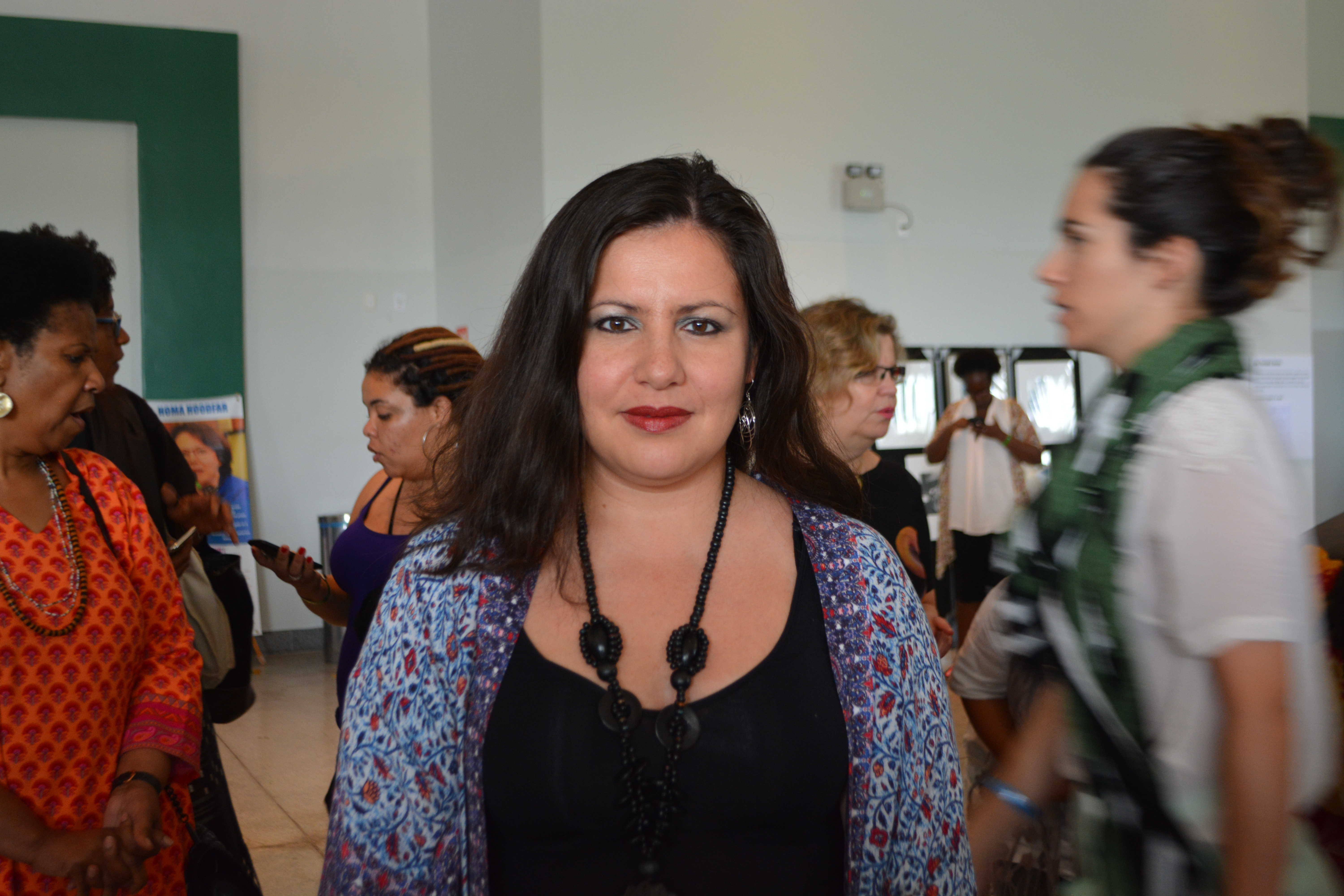 Feminista en AWID 2016